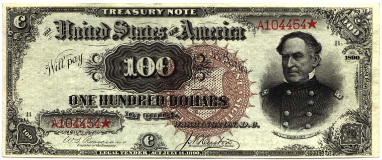 One hundred dollar bill series 1890 featuring David Farragut